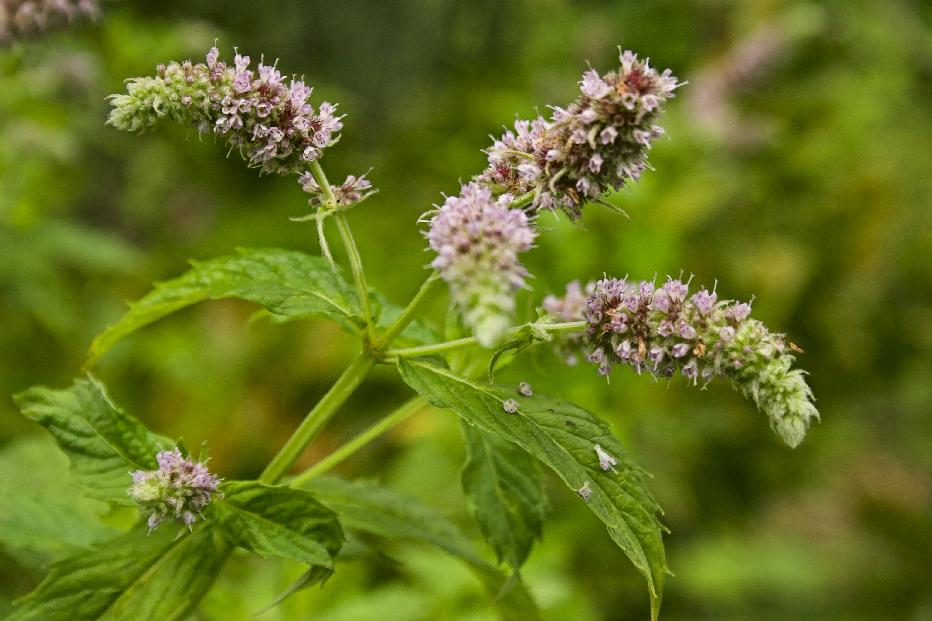 Mentha spicata detail from Maramureş Mountains.